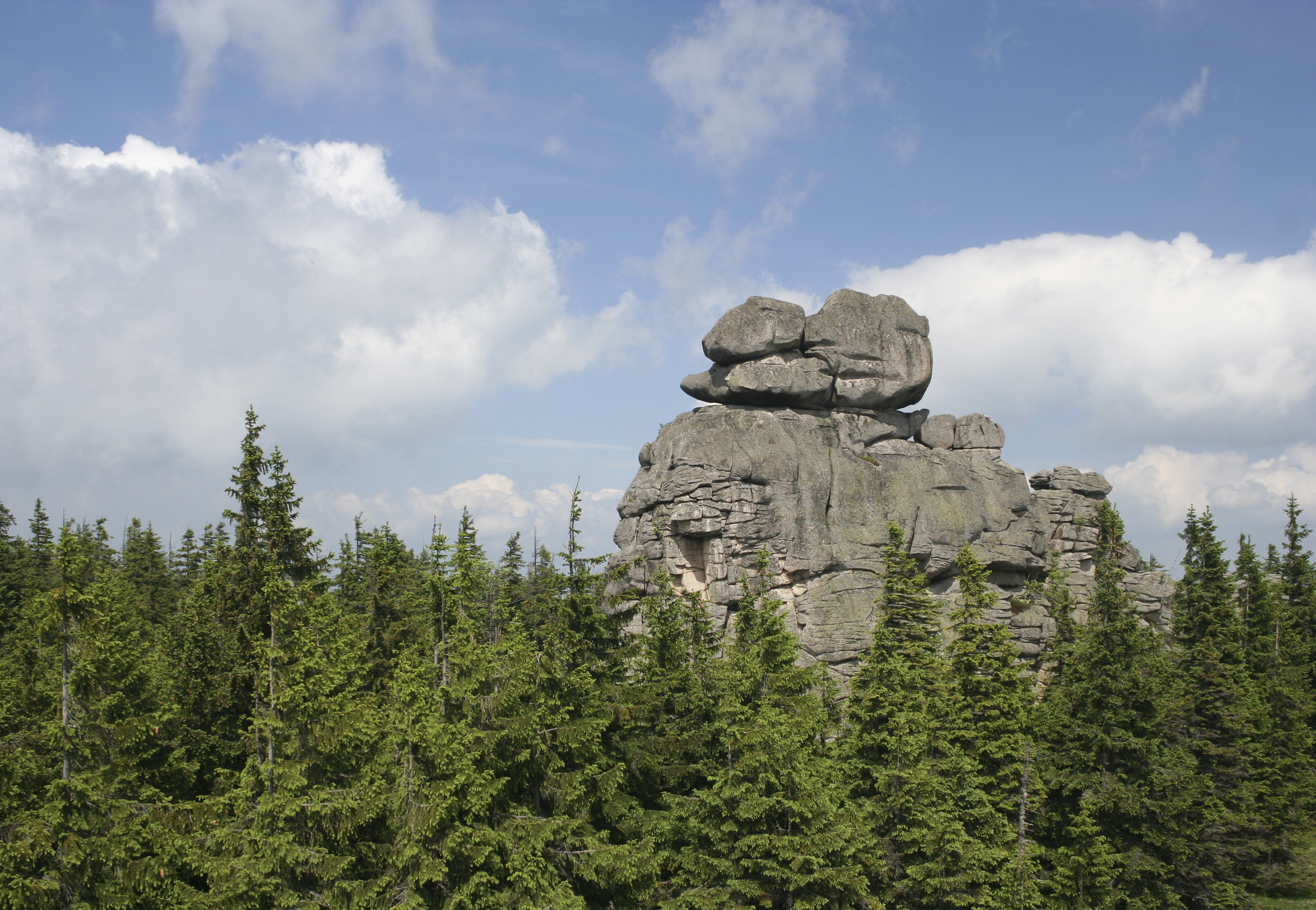 Pielgrzymy, Karkonosze, Lower Silesia, Poland.